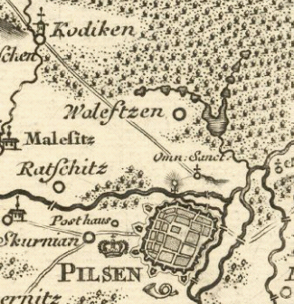 Bolevecké rybníky u vsi Bolevec (Woleftzen) nedaleko Plzně (Pilsen) na výřezu z mapy Jana Kryštofa Müllera z roku 1720.